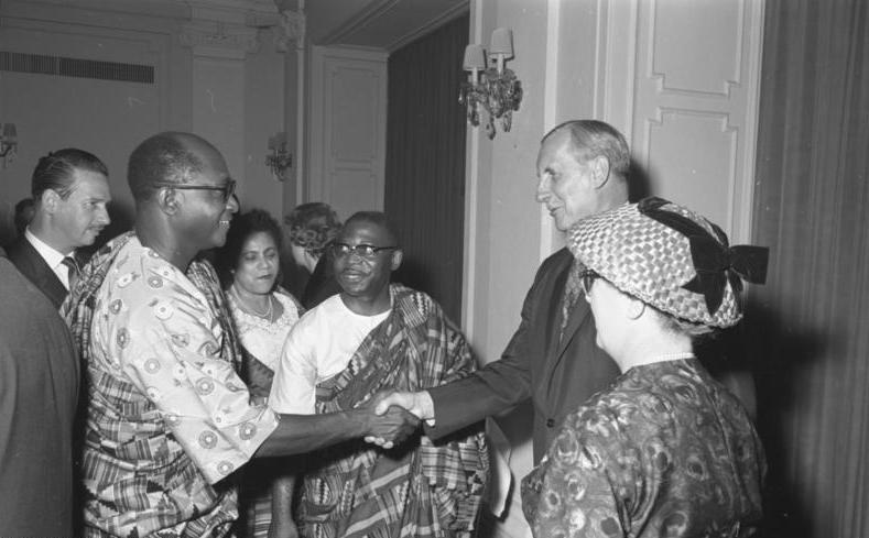 Besuch des Finanzministers von Ghana, Gbedemah Empfang in der "Redoute" durch die Botschaft Ghana